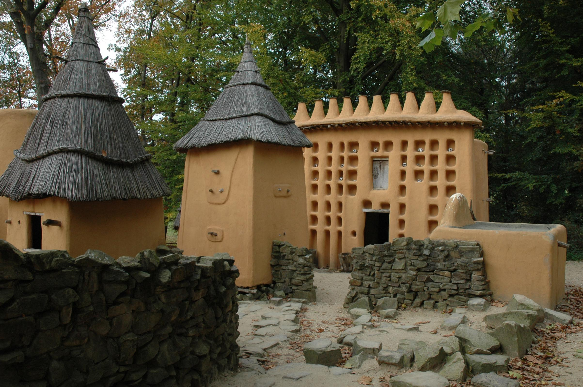 Afrika museum - Berg en Dal